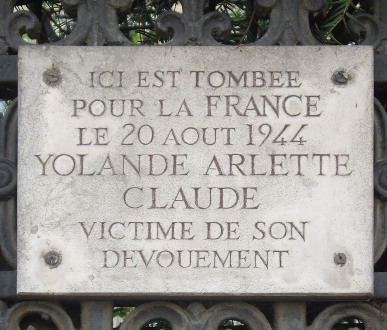 Plaque commémorative, place Charles-de-Gaulle, Paris 16e, à l'angle de l'avenue Victor-Hugo. « Ici est tombée pour la France, le 20 août 1944, Yolande Arlette Claude, victime de son dévouement. »